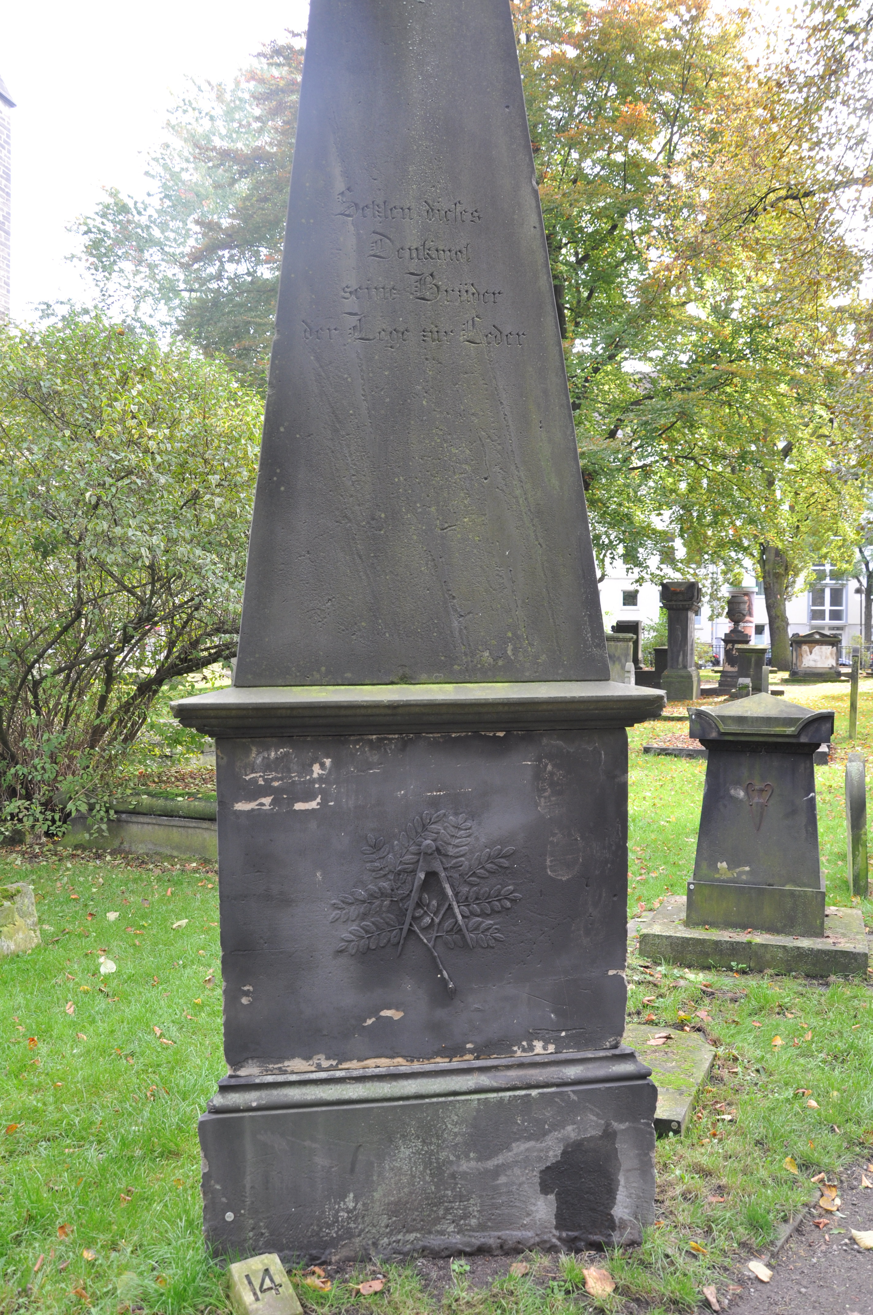 Hannover, Gartenfriedhof, Grabmal Carl Klopp (1805–1840), Pastor an der Gartenkirche 1839–1840, Grabmal gestiftet von der "Loge zur Zeder"